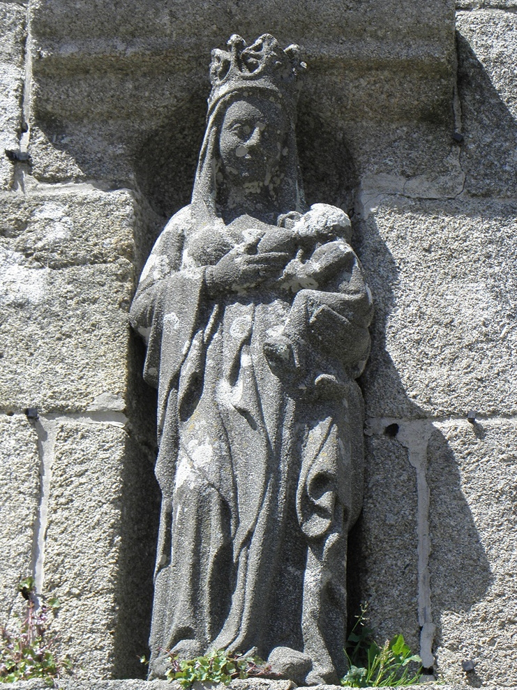 Vierge allaitante du porche de l'église Saint-Colomban de Plougoulm (29).